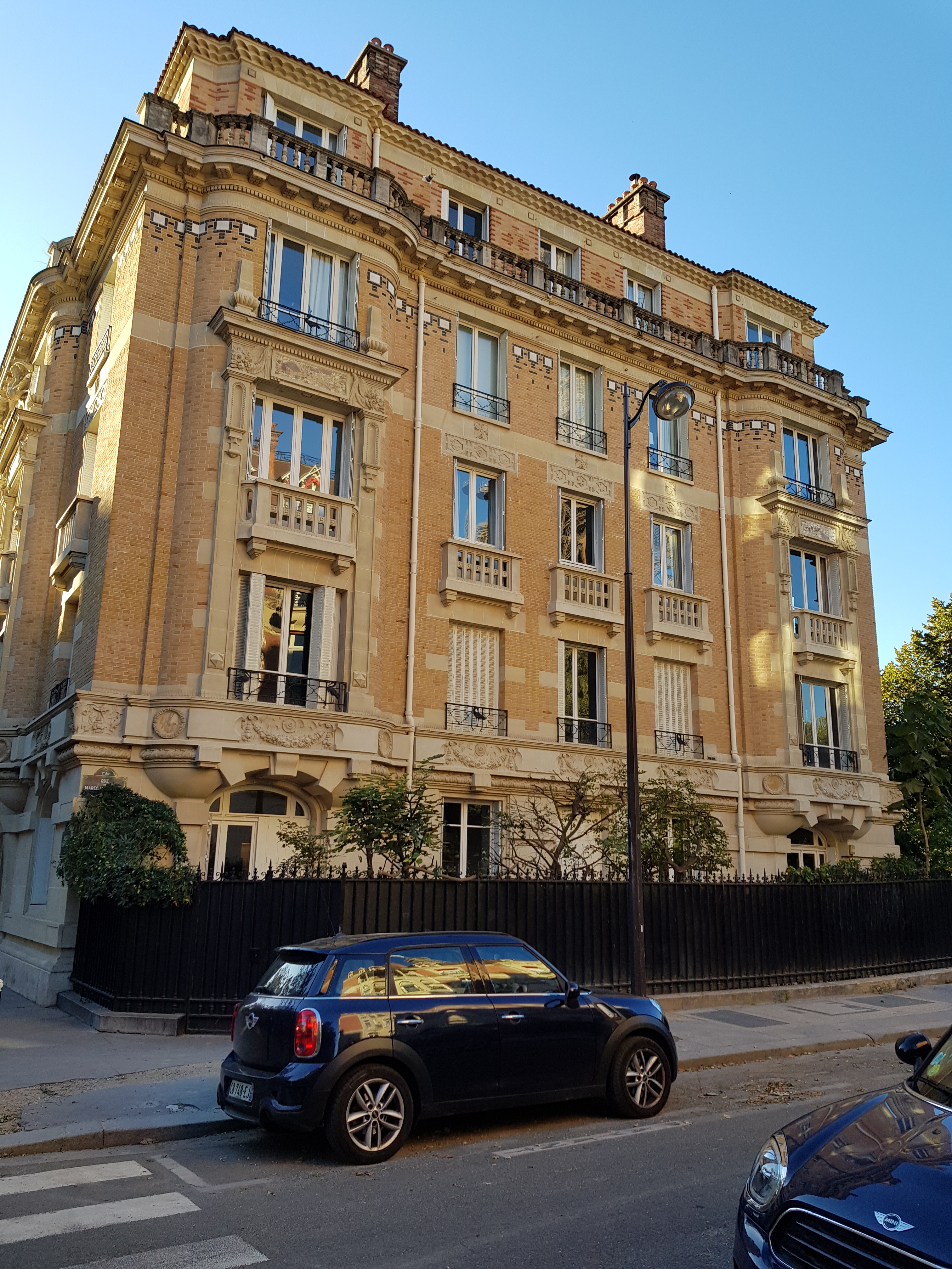 Immeuble à l'angle de la rue Elisée-Reclus et de la rue du Maréchal-Harispe, Paris 7e.